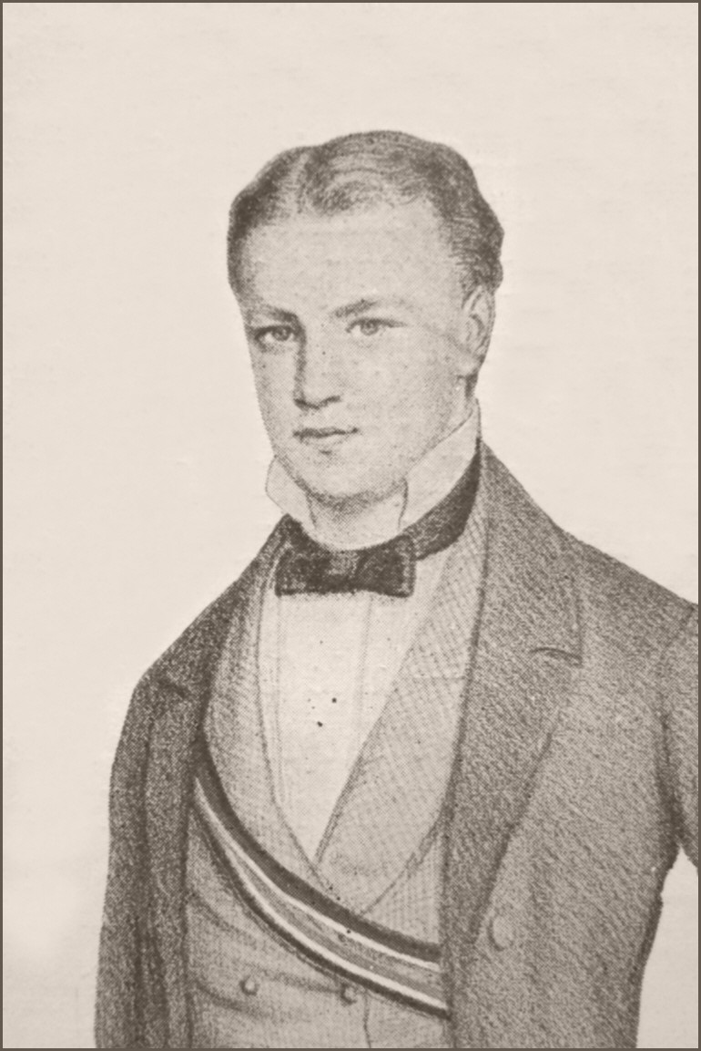 Lithographie des späteren Ministerialbeamten Heinrich Konrad von Studt